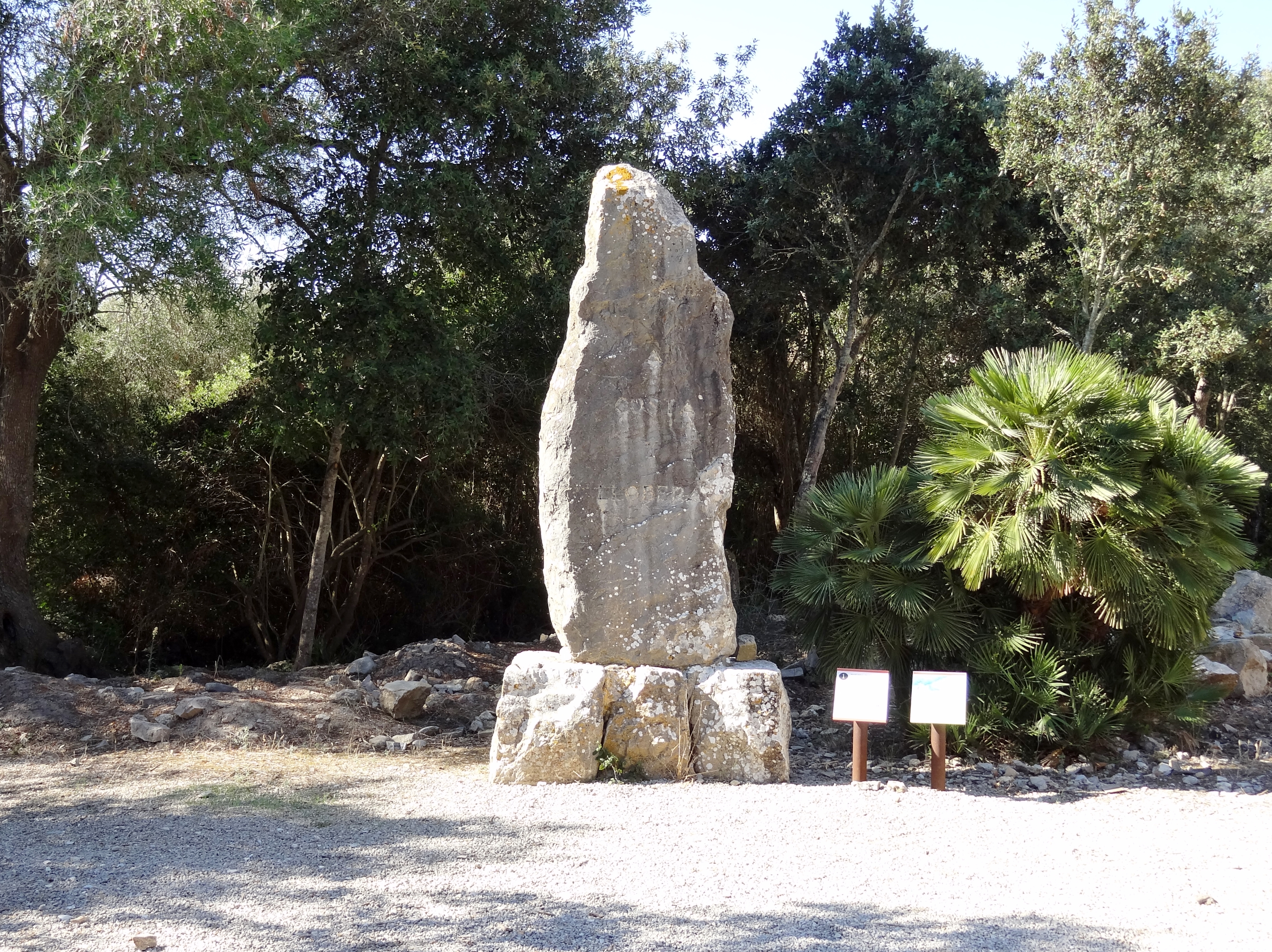 Monolith zu Ehren von Miquel Costa i Llobera vor der talaiotischen Siedlung von Ses Païsses südöstlich von Artà, Mallorca, Spanien